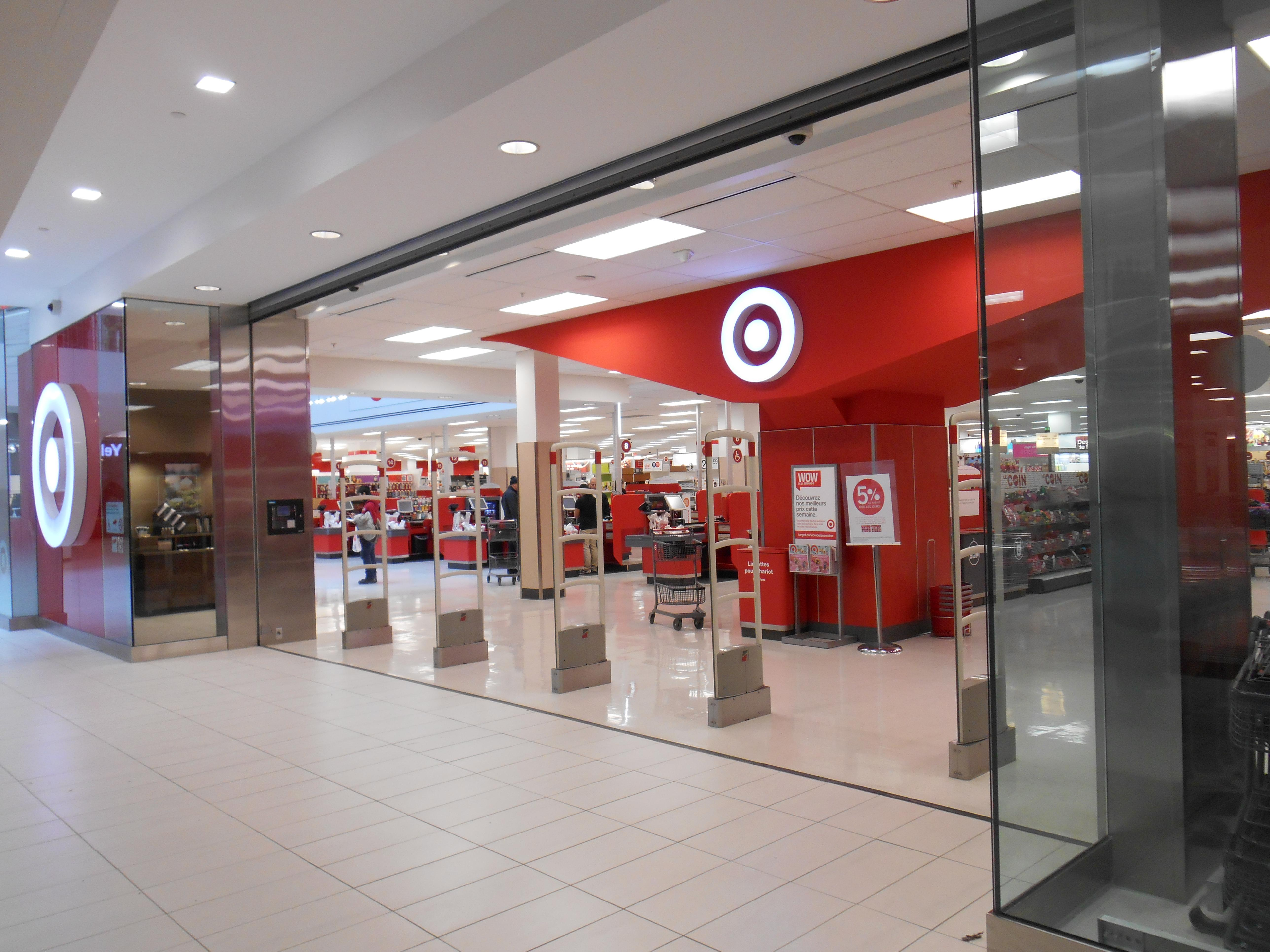 Target, place Alexis-Nihon